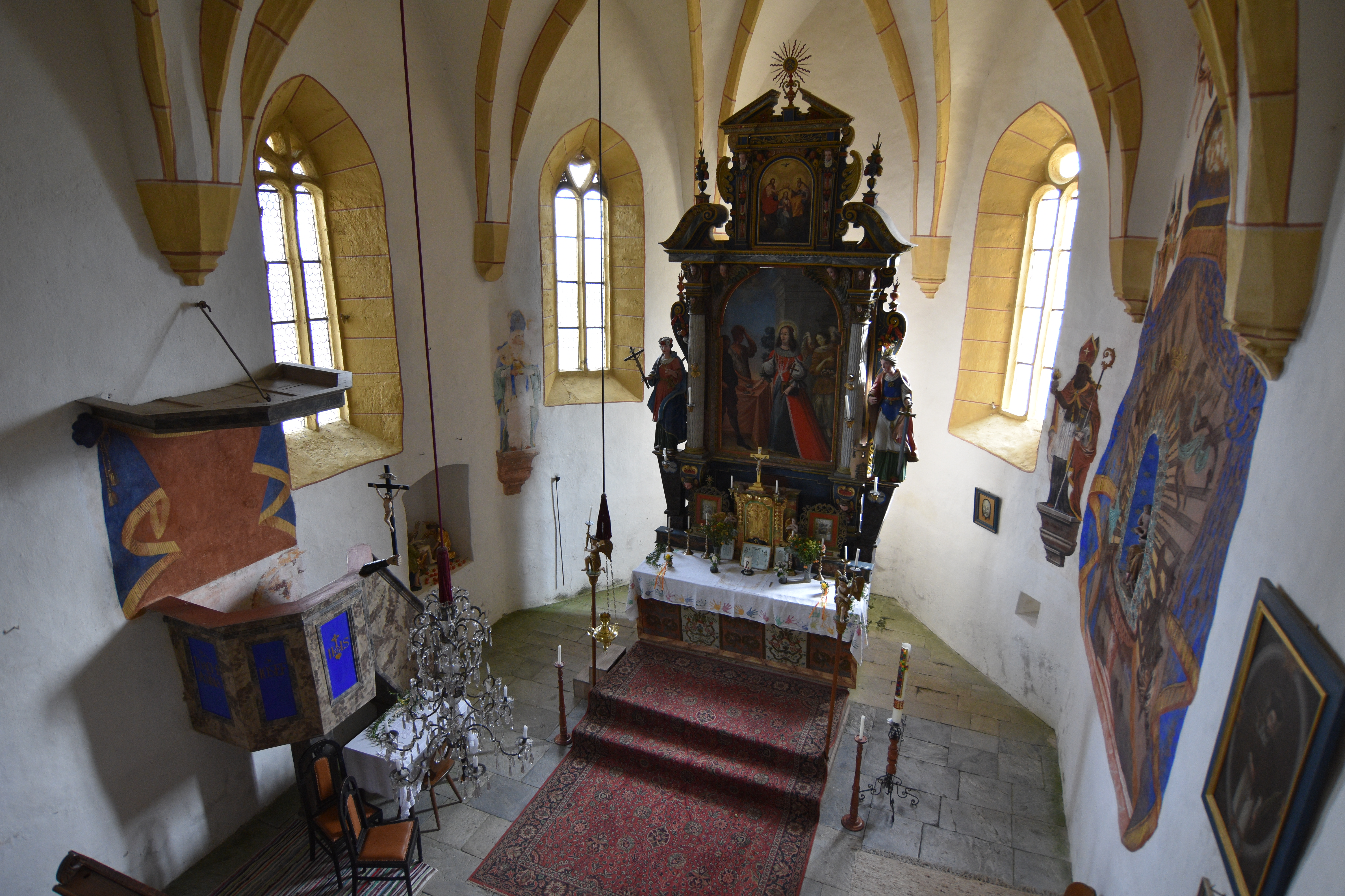 Filialkirche Sankt Hemma - Interior